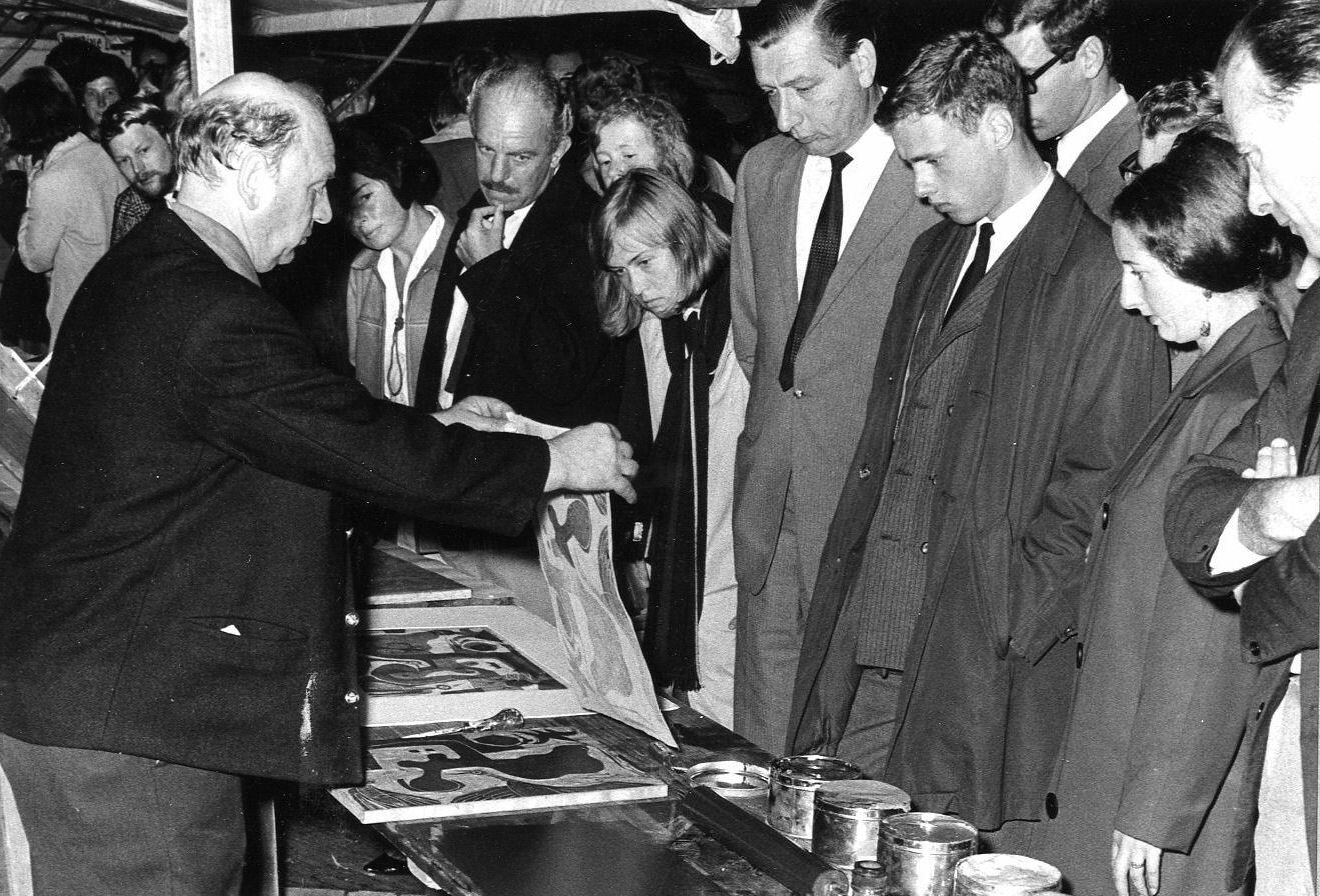 Toon van Ham demonstreert de druk met linoleumsneden.